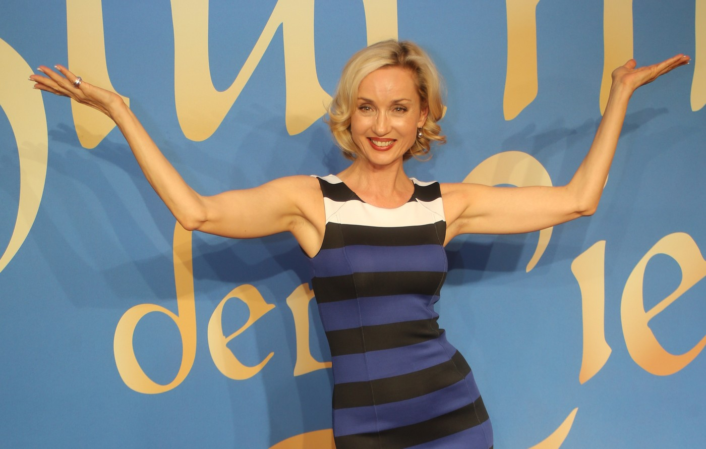 Isabella Hübner, deutsche Schauspielerin. Hier beim exklusiven Fanevent "Serienmarathon" (Sturm der Liebe, ARD) am 15. September 2015 im Mathäser Filmpalast in München auf dem roten Teppich.